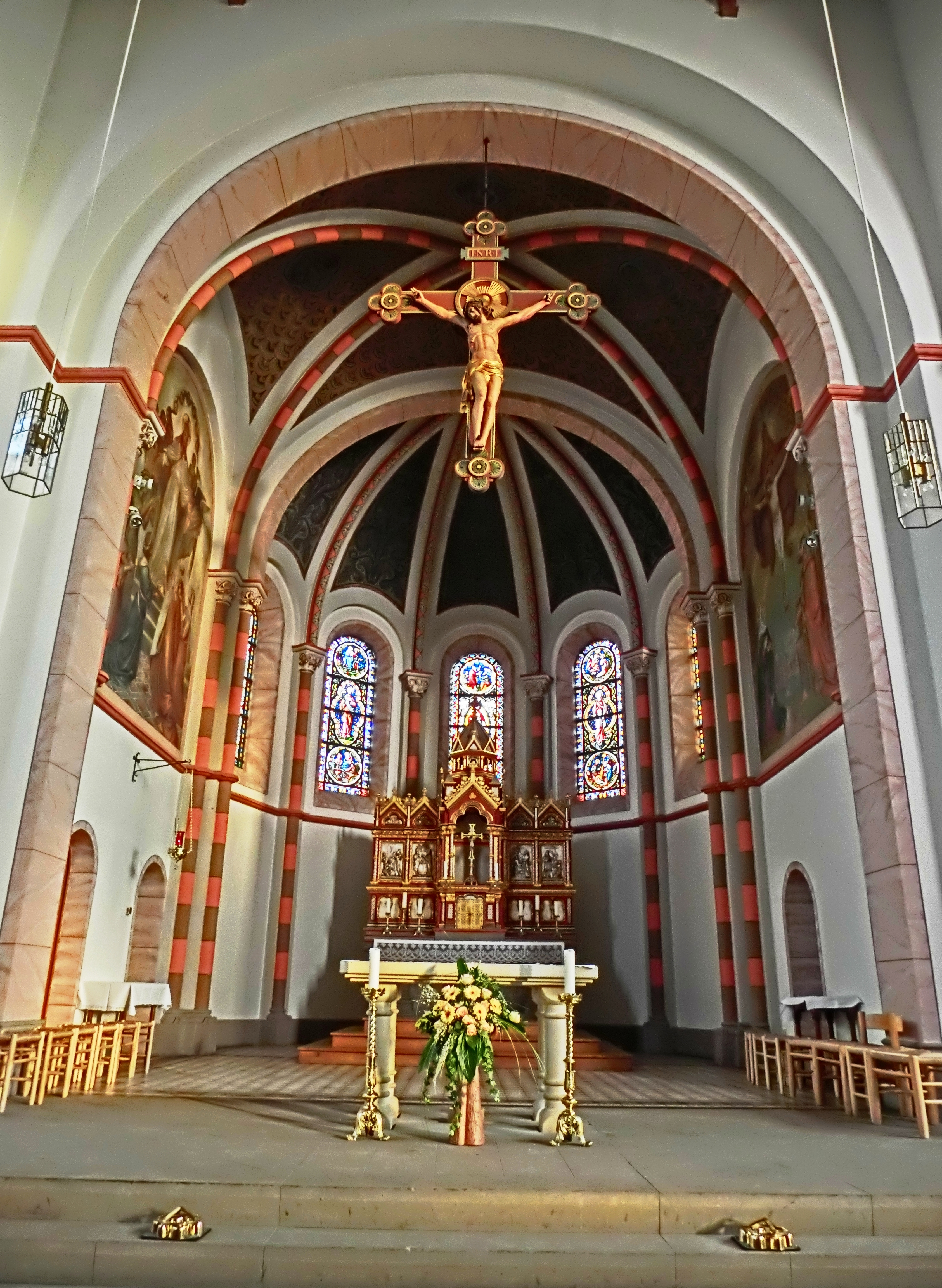 St. Martin (Nörten-Hardenberg) Hauptaltar